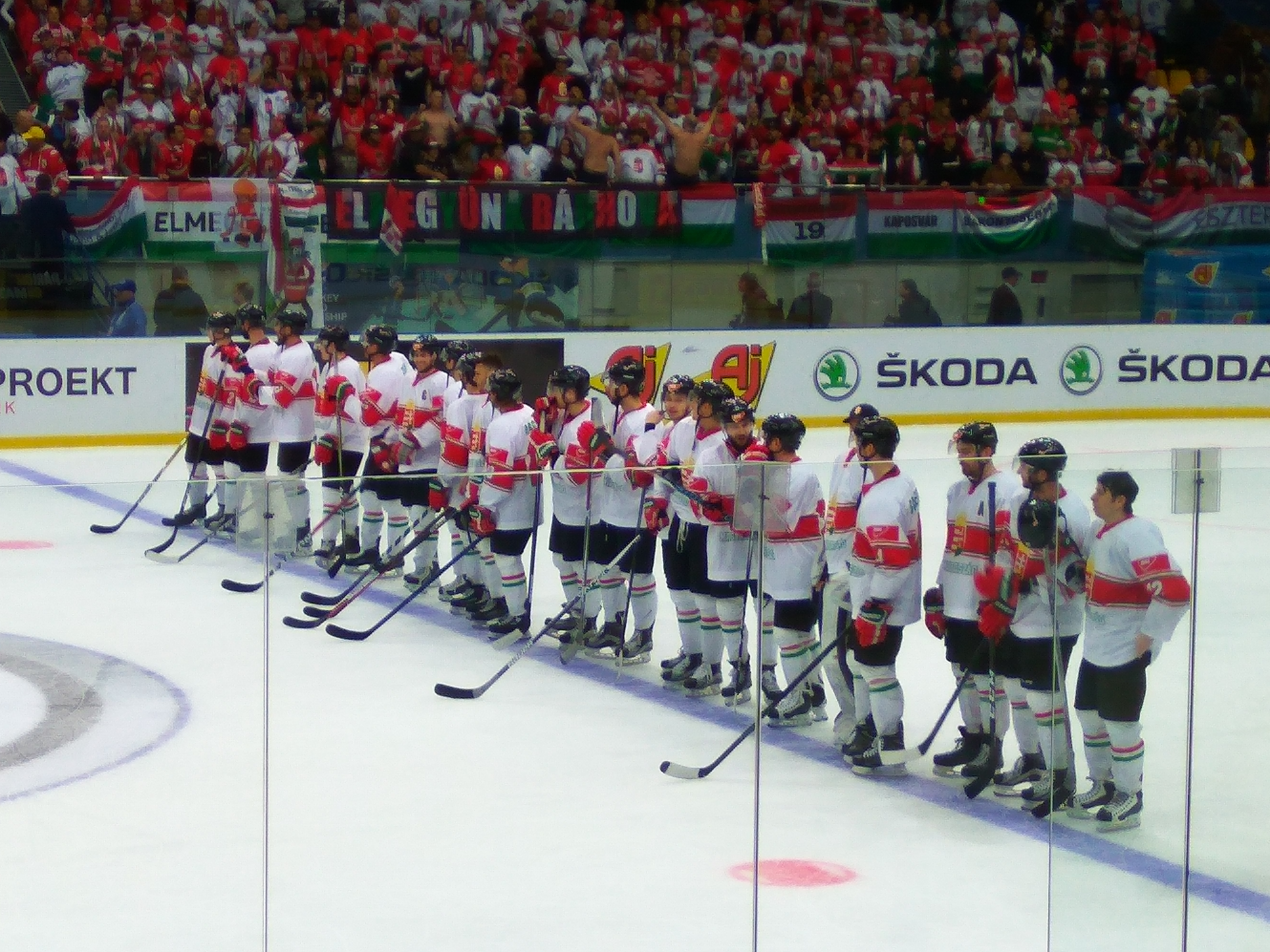 Чемпіонат світу з хокею 2017 (I дивізіон) Україна-Угорщина